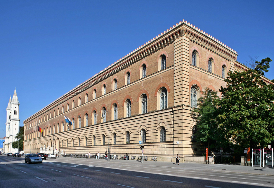 Aussenaufnahme der Bayerischen Staatsbibliothek